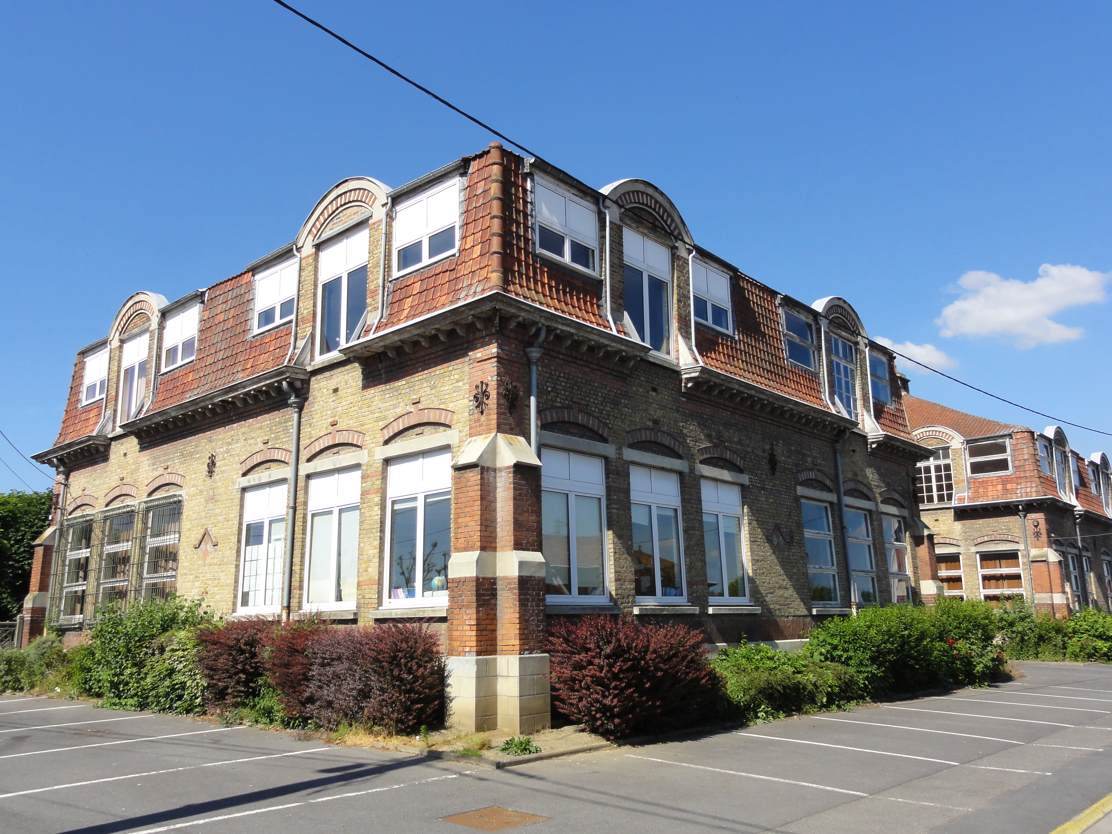 Écoles des cités de la Fosse Notre Dame de la Compagnie des mines d'Aniche, Waziers, Nord, Nord-Pas-de-Calais, France.